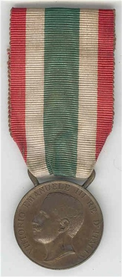 Medaglia a ricordo dell'Unità d'Italia 1848-1922